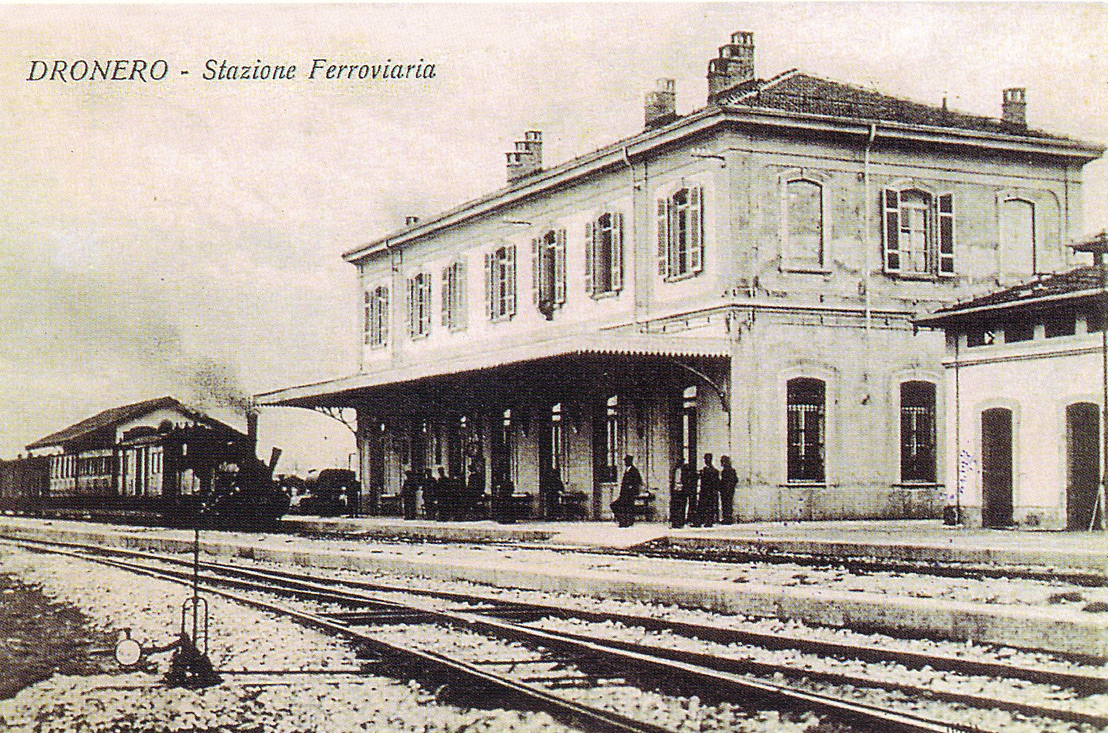 La stazione ferroviaria di Dronero in una cartolina d'epoca.